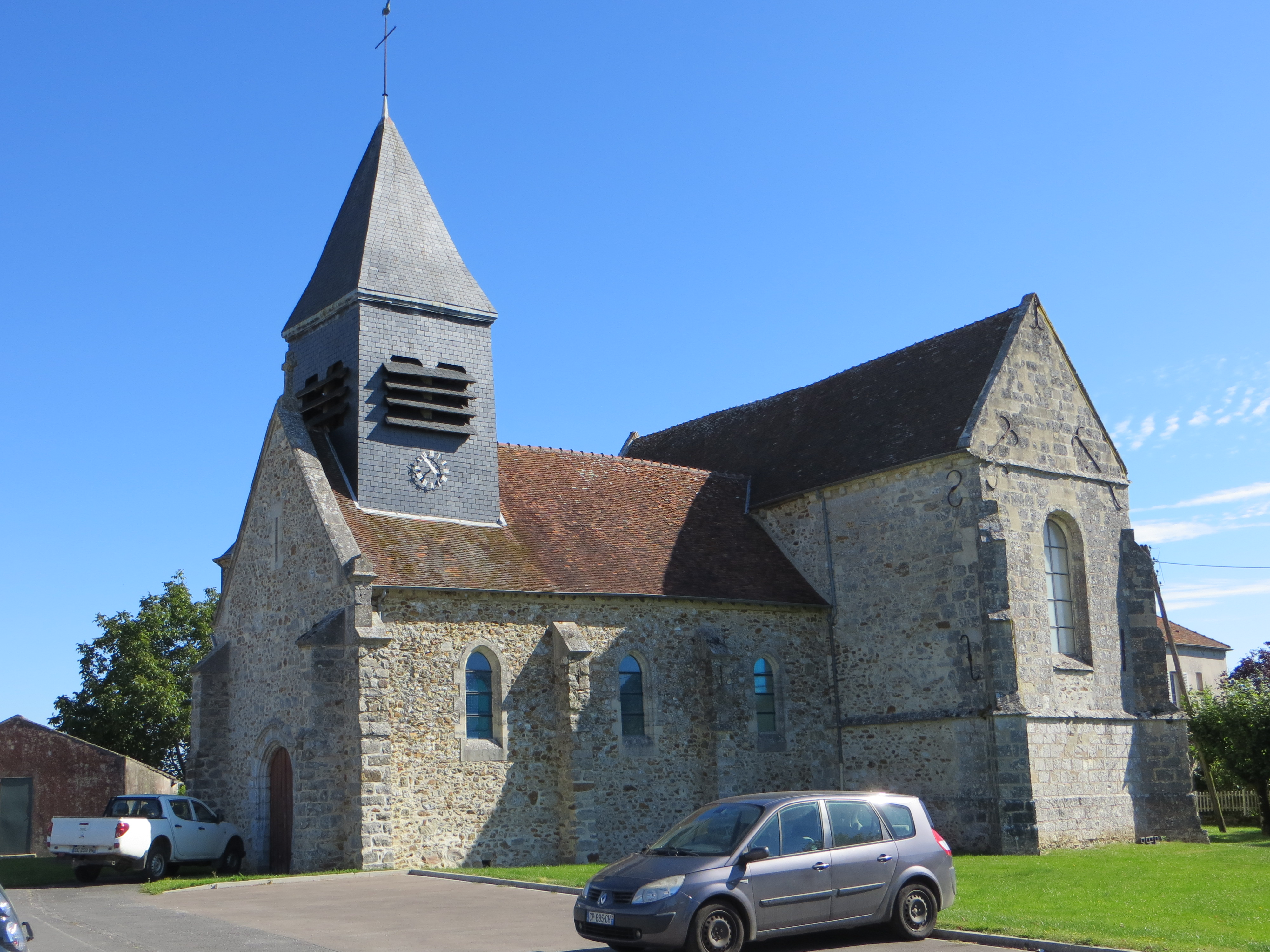 Vue générale de l'église